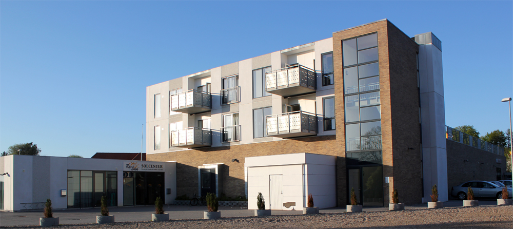 "Centeret" i Søften midtby, som ligger lige opad Søften forsamlingshus.